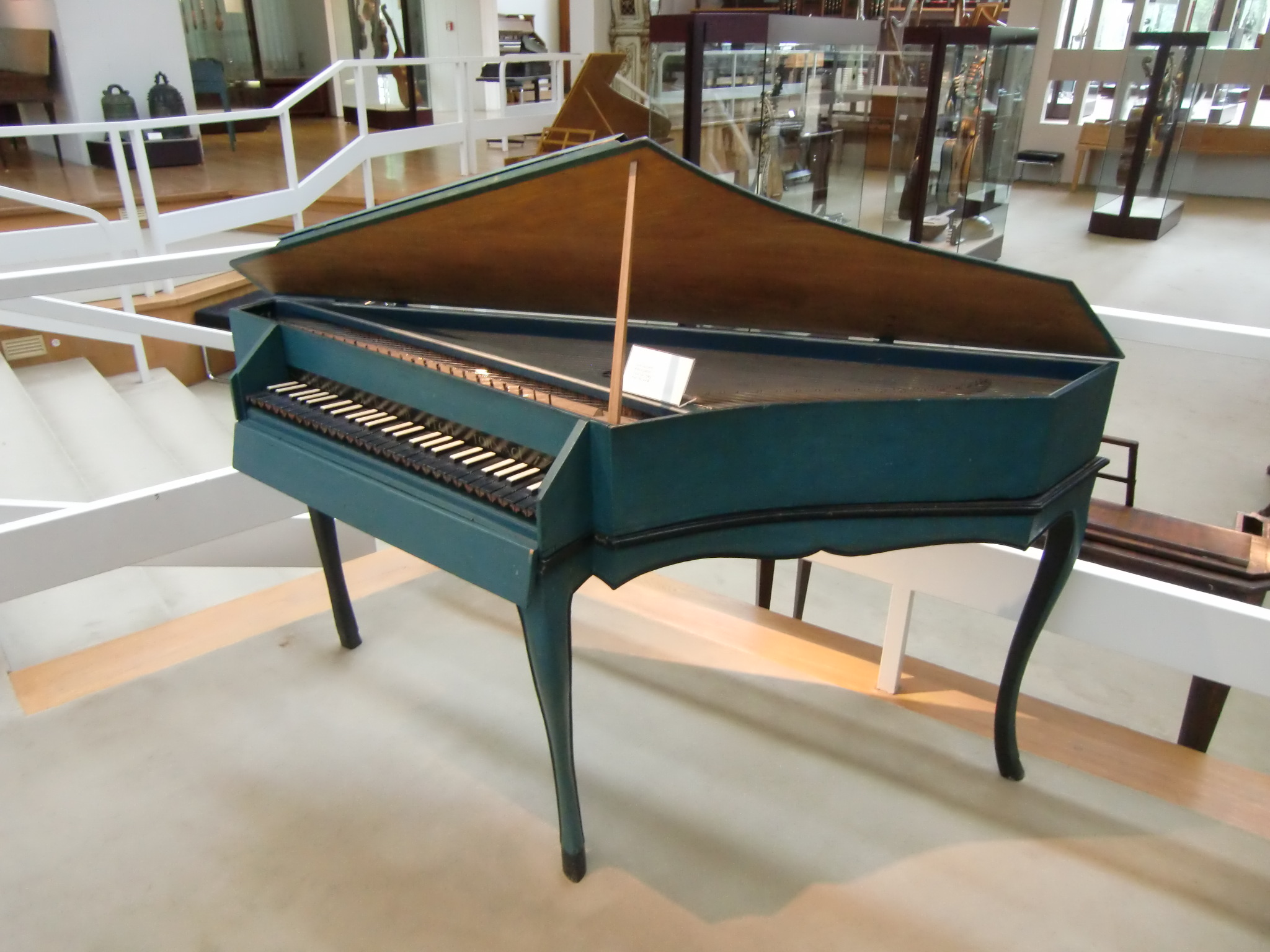 Epinette d'Albert Delin (Tournai, 1765) - Berlin, Musikinstrumentenmuseum